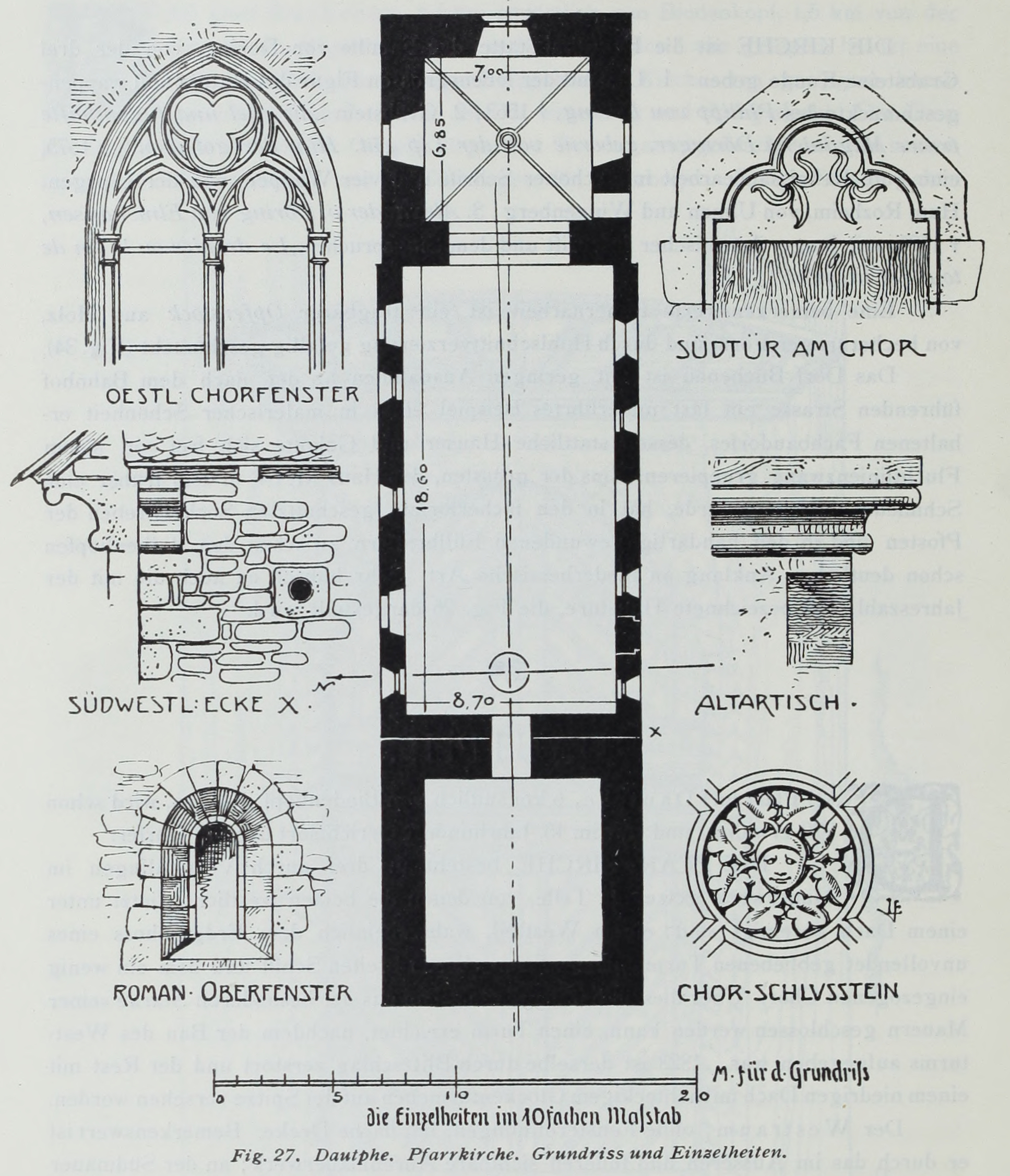 Dautphe, Pfarrkirche: Grundriss und Einzelheiten